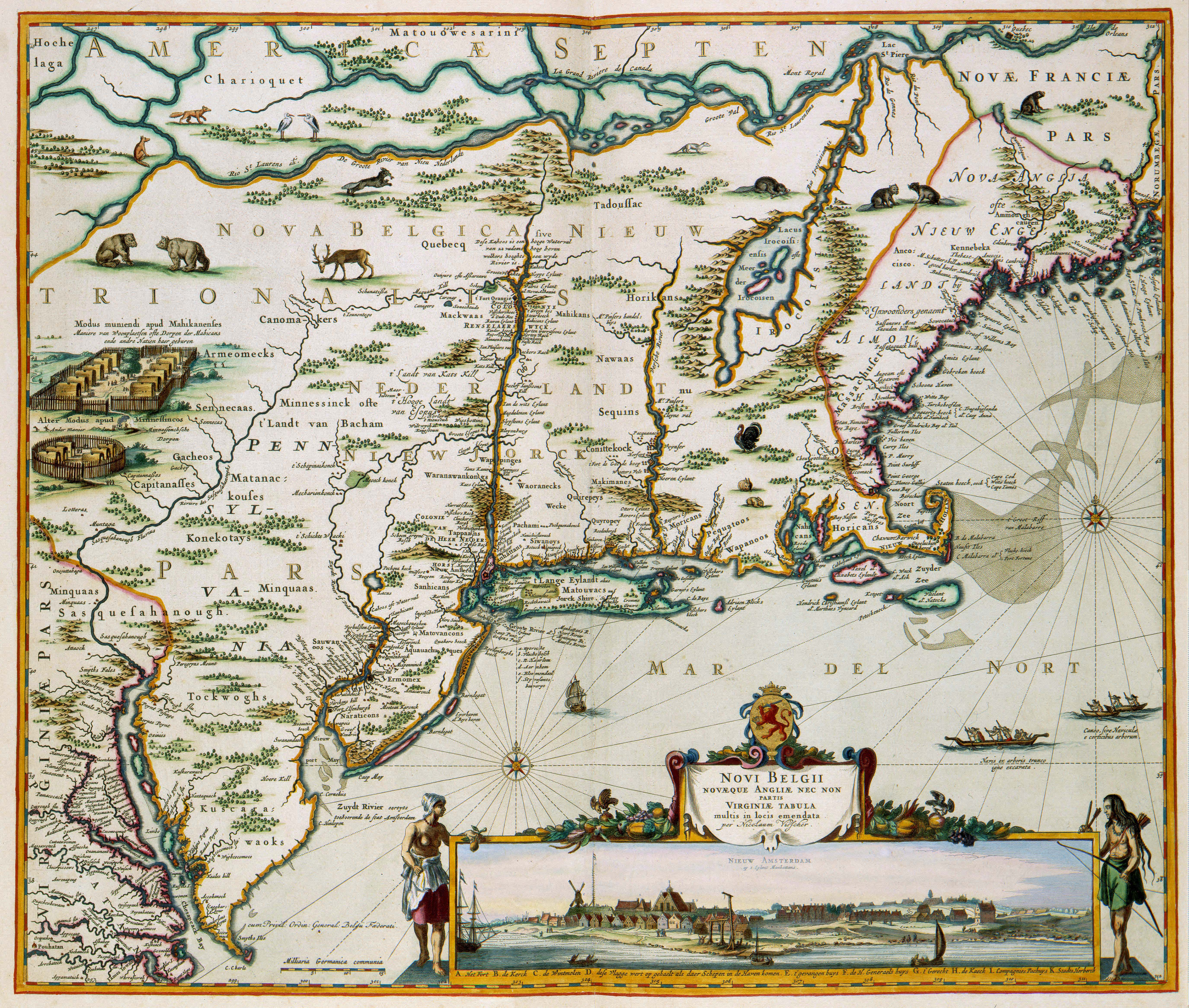 Vervaardigd in ca. 1684. This map of the current New England was published by Nicolaes Visscher II (1649-1702). Visscher copied first a map by Jan Janssonius (1588-1664) from 1651 and added a view of New Amsterdam, the current Manhattan. The map is very accurate: each European town which existed at the time has been represented.